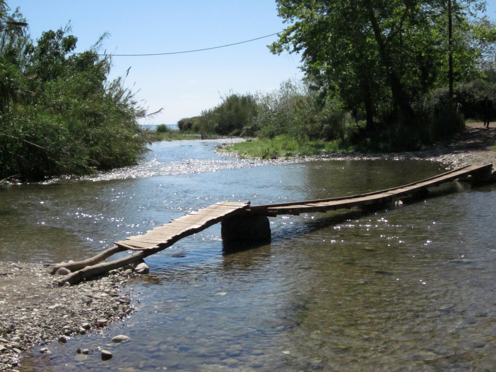 Olympos - Çıralı. Footbridge over Ulupınar river